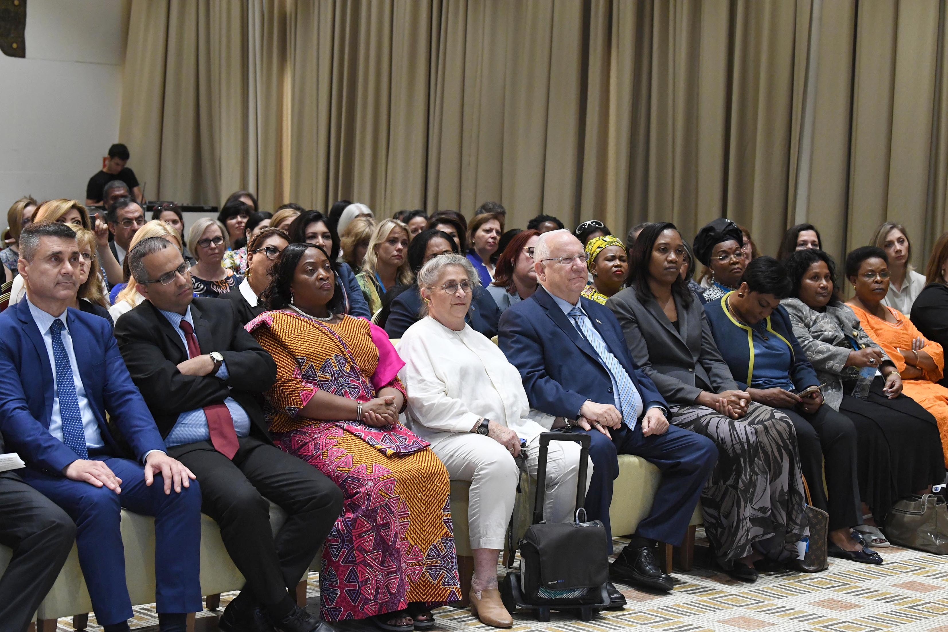 ראובן ריבלין נשיא מדינת ישראל ורעייתו נחמה ריבלין אירחו את כנס נשים מנהיגות ה-30 שמאורגן על ידי מש"ב - המרכז לשיתוף פעולה בינלאומי של משרד החוץ של ישראל. שלישית משמאל ג'ואל טיילור סגנית נשיא ליבריה